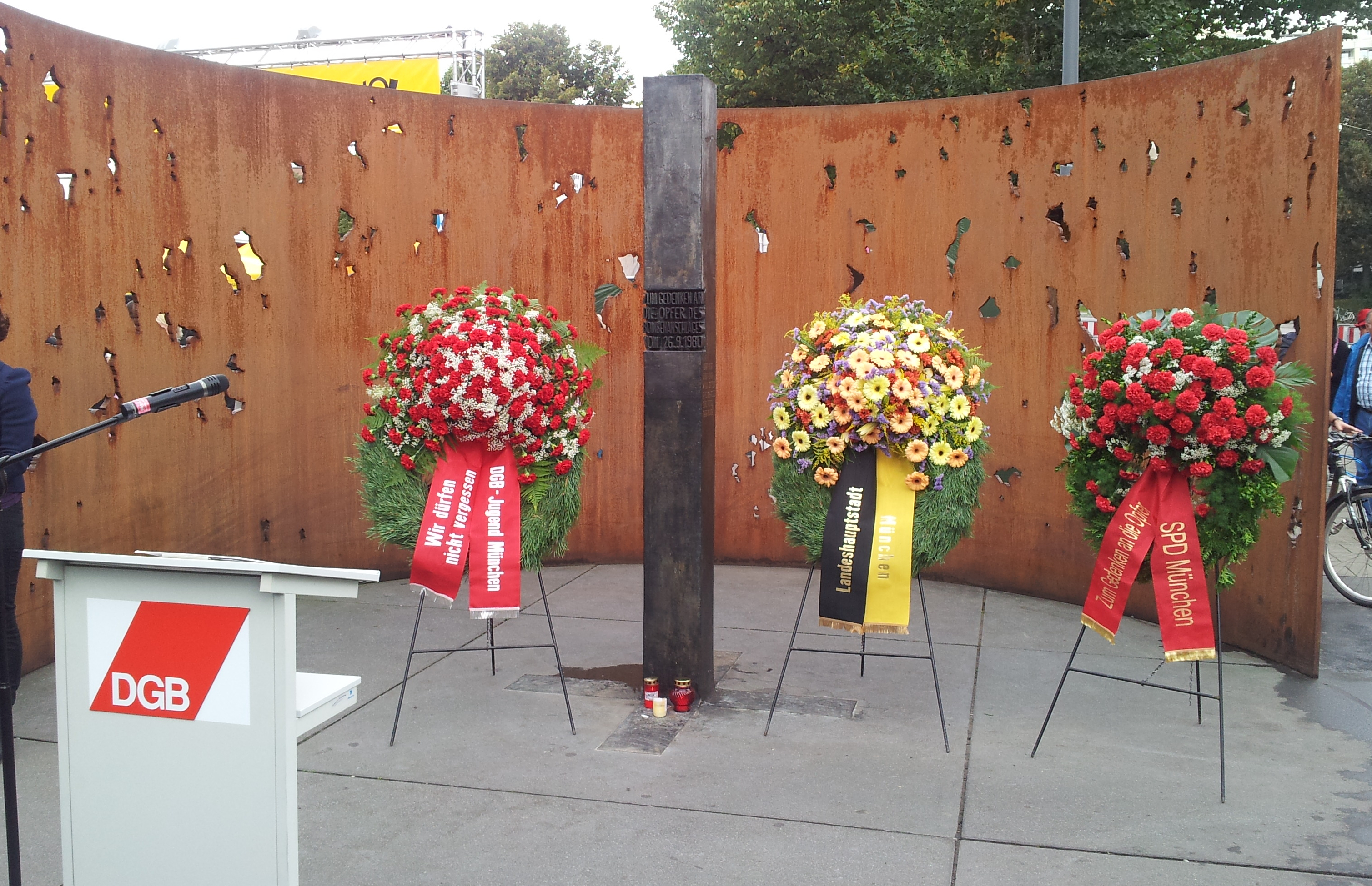 Gedenkveranstaltung der DGB Jugend München zum Oktoberfestattentat am 26.09.1980.